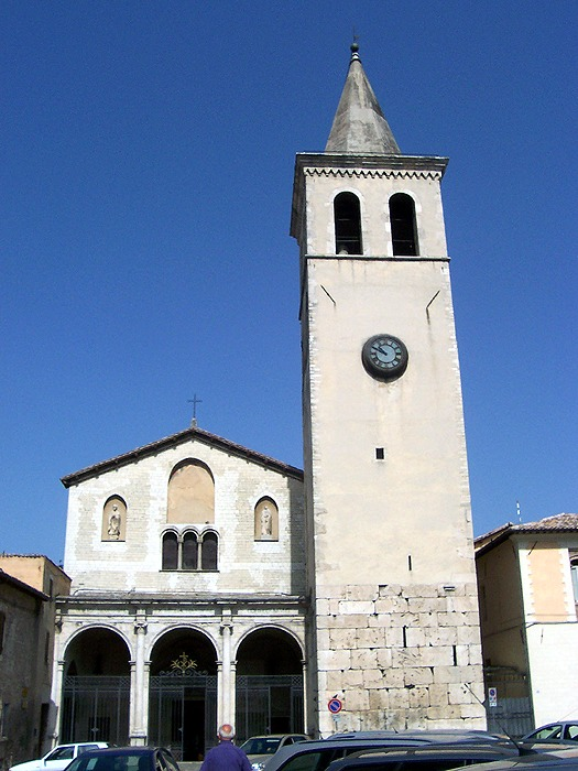 Spoleto - Chiesa di S. Gregorio Maggiore